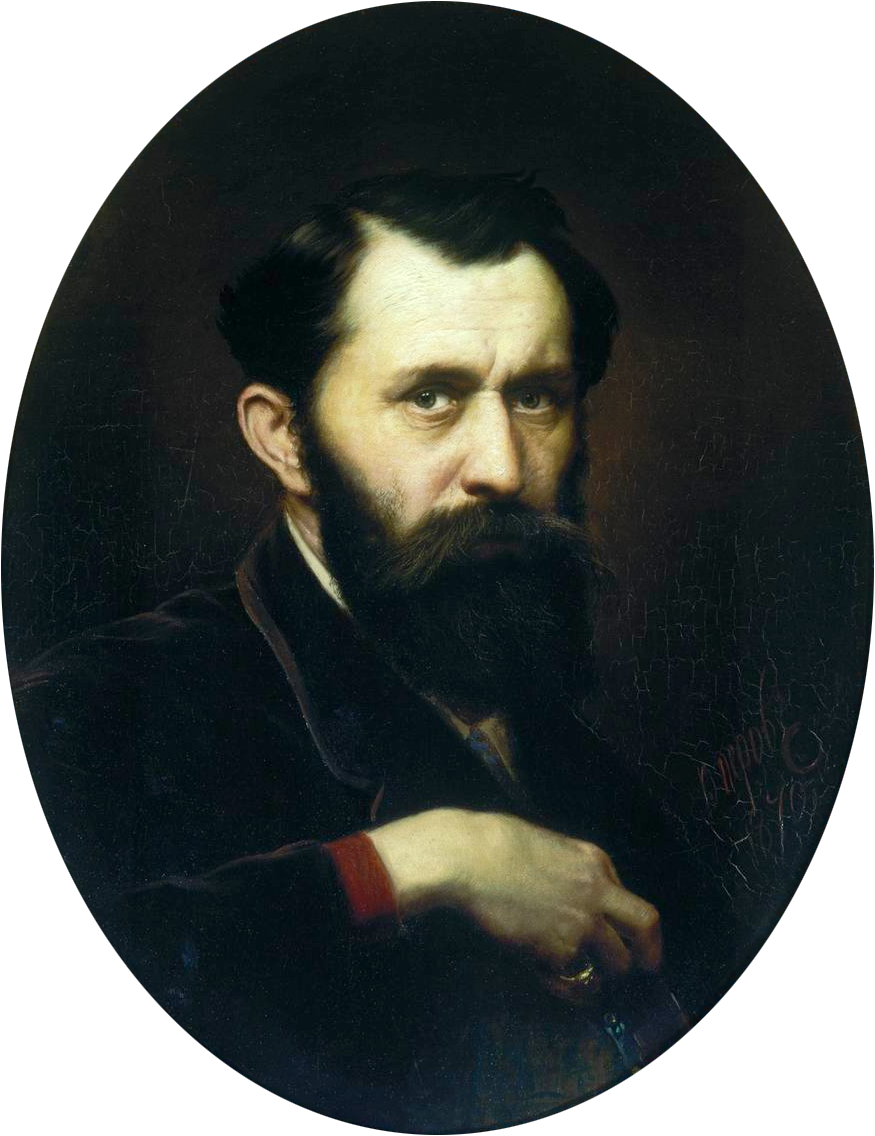 Self-portraitХ. , м. 59, 7х46 ГТГ